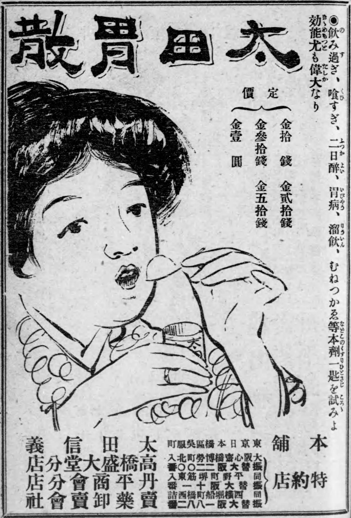 塩見伊八郞編纂『賣藥製法全書』艸樂新聞社、1917年。